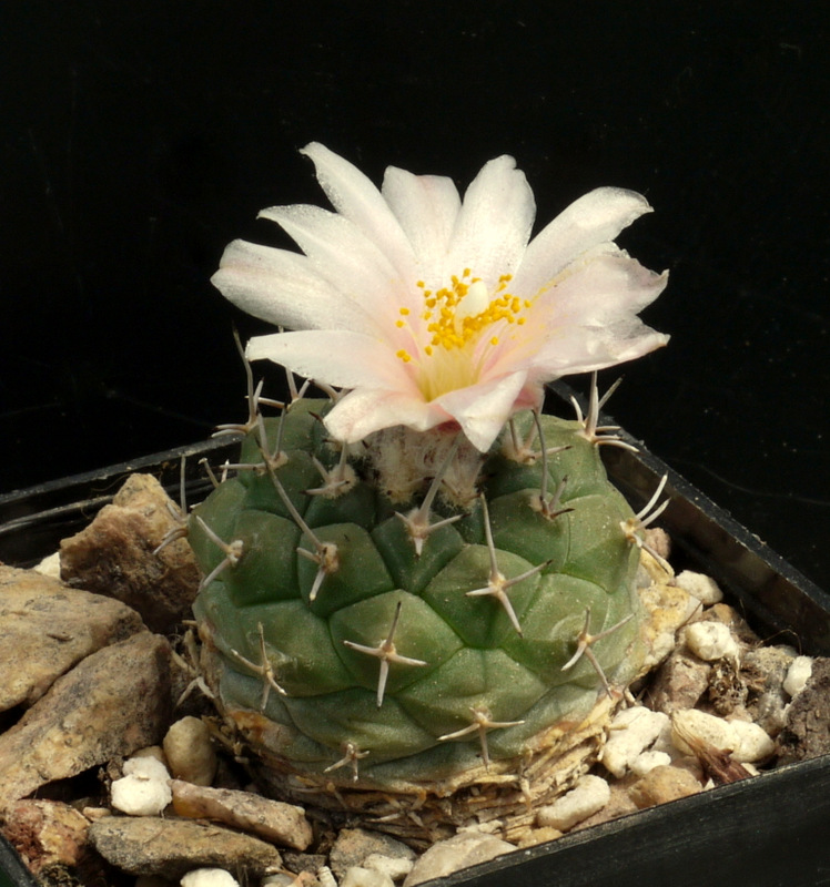 Turbinicarpus lophophoroides in Blüte.